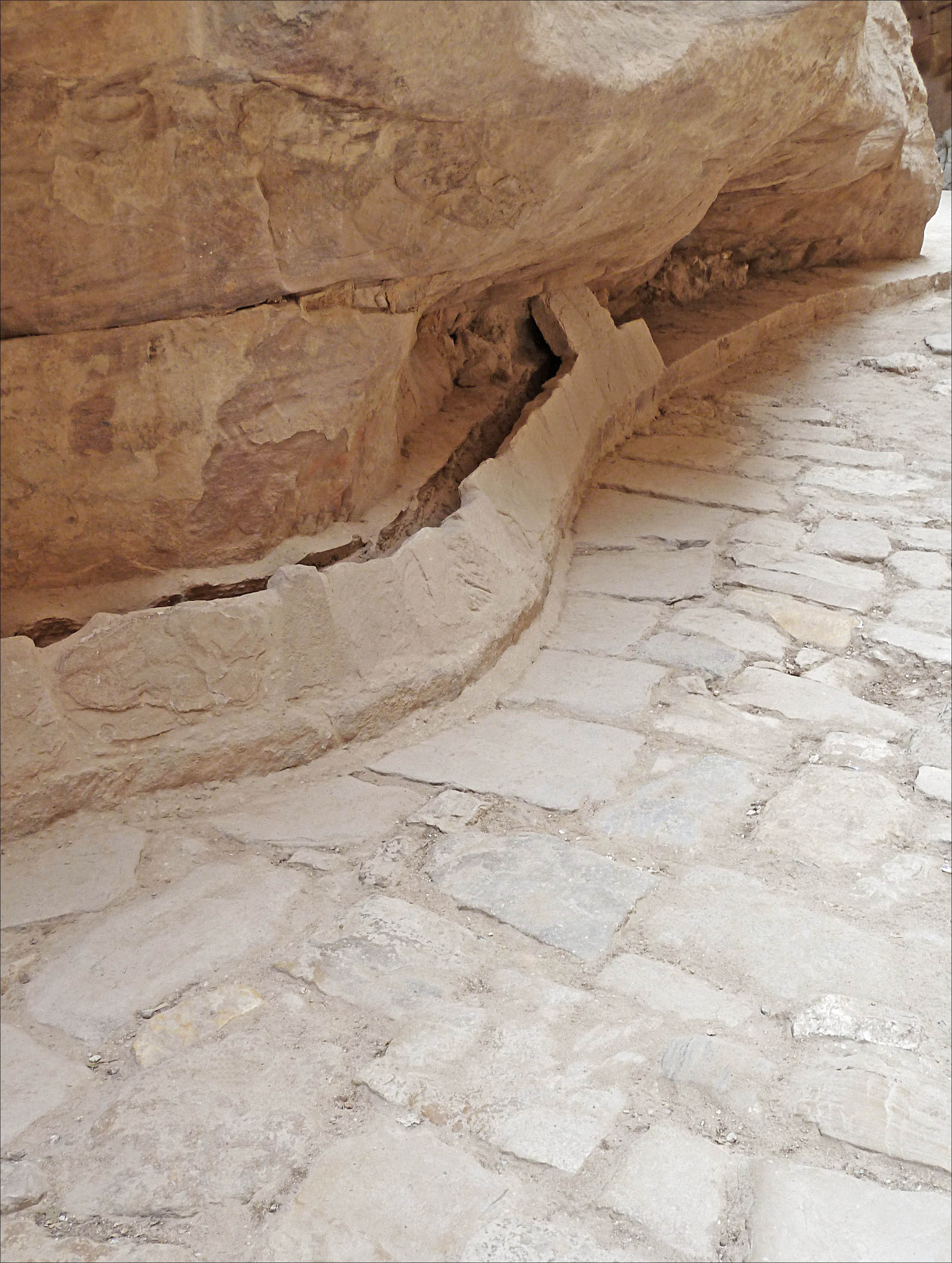 Canal et pavage nabatéens le long du Siq, avec détail de l’ancienne couverture du canal en pierres plates.